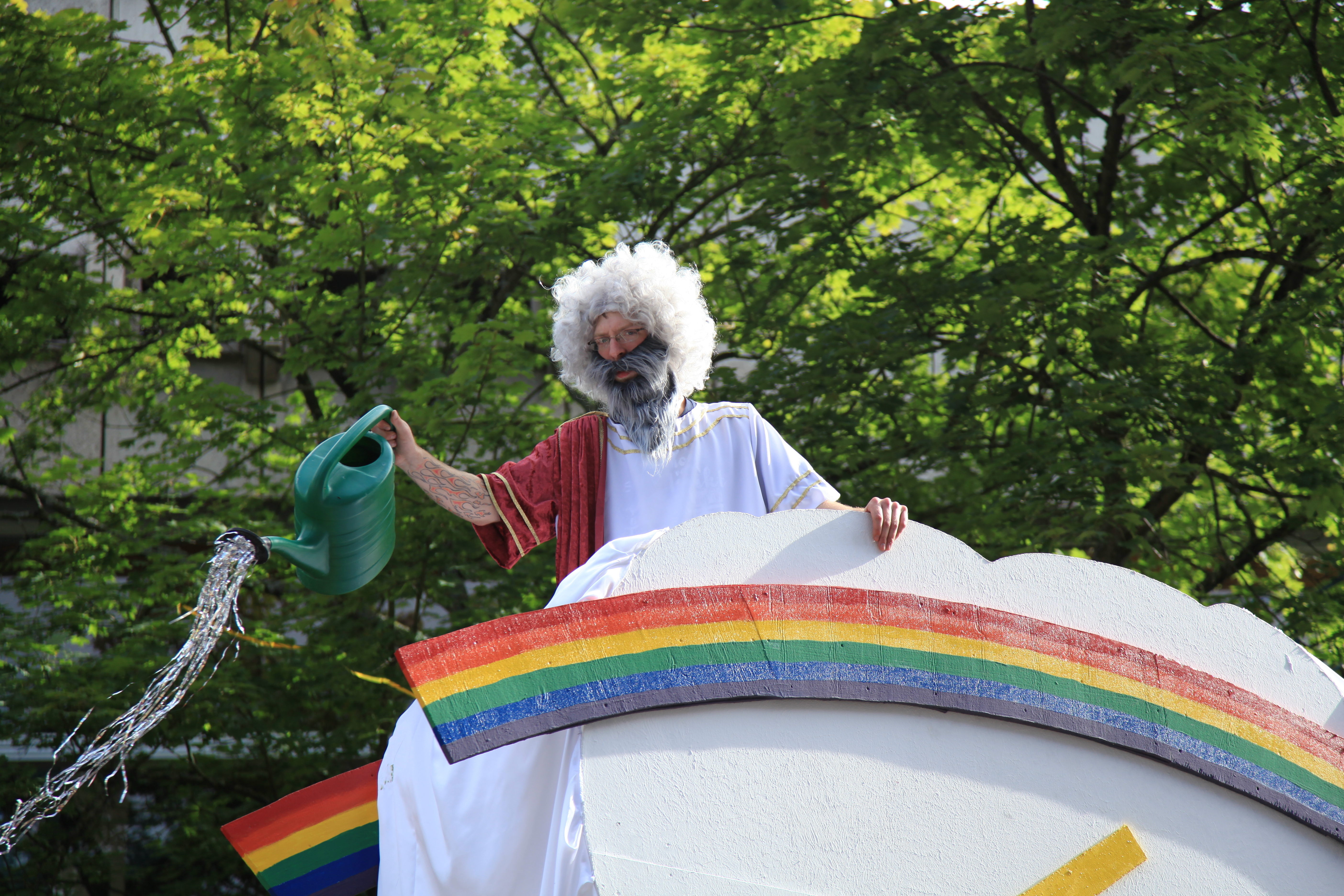 Schwelmer Heimatfest am 02. Sep. 2012